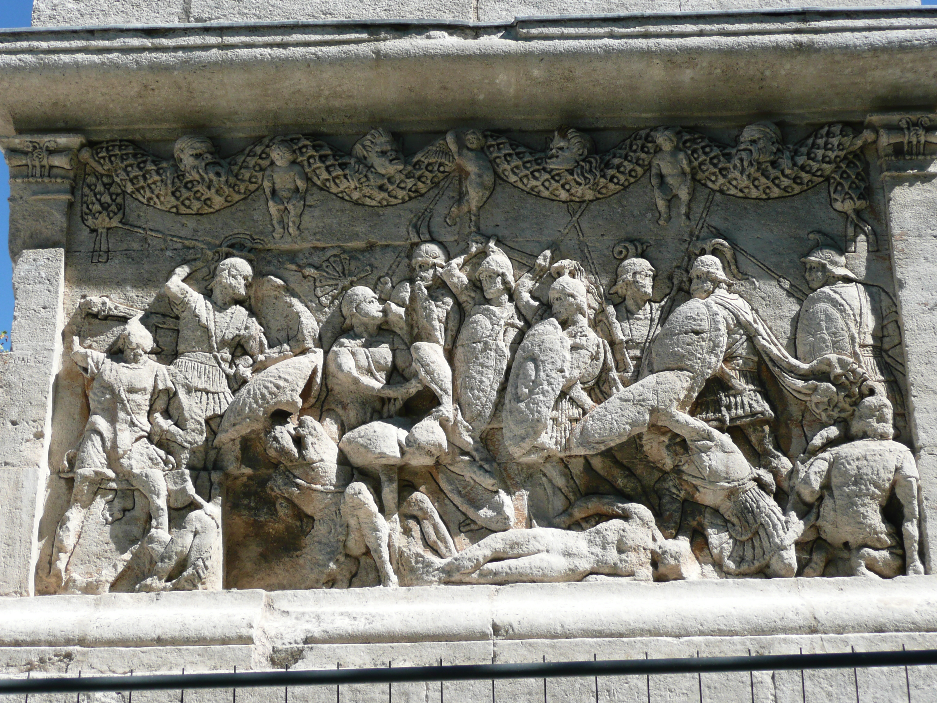 Glanum mausoleum